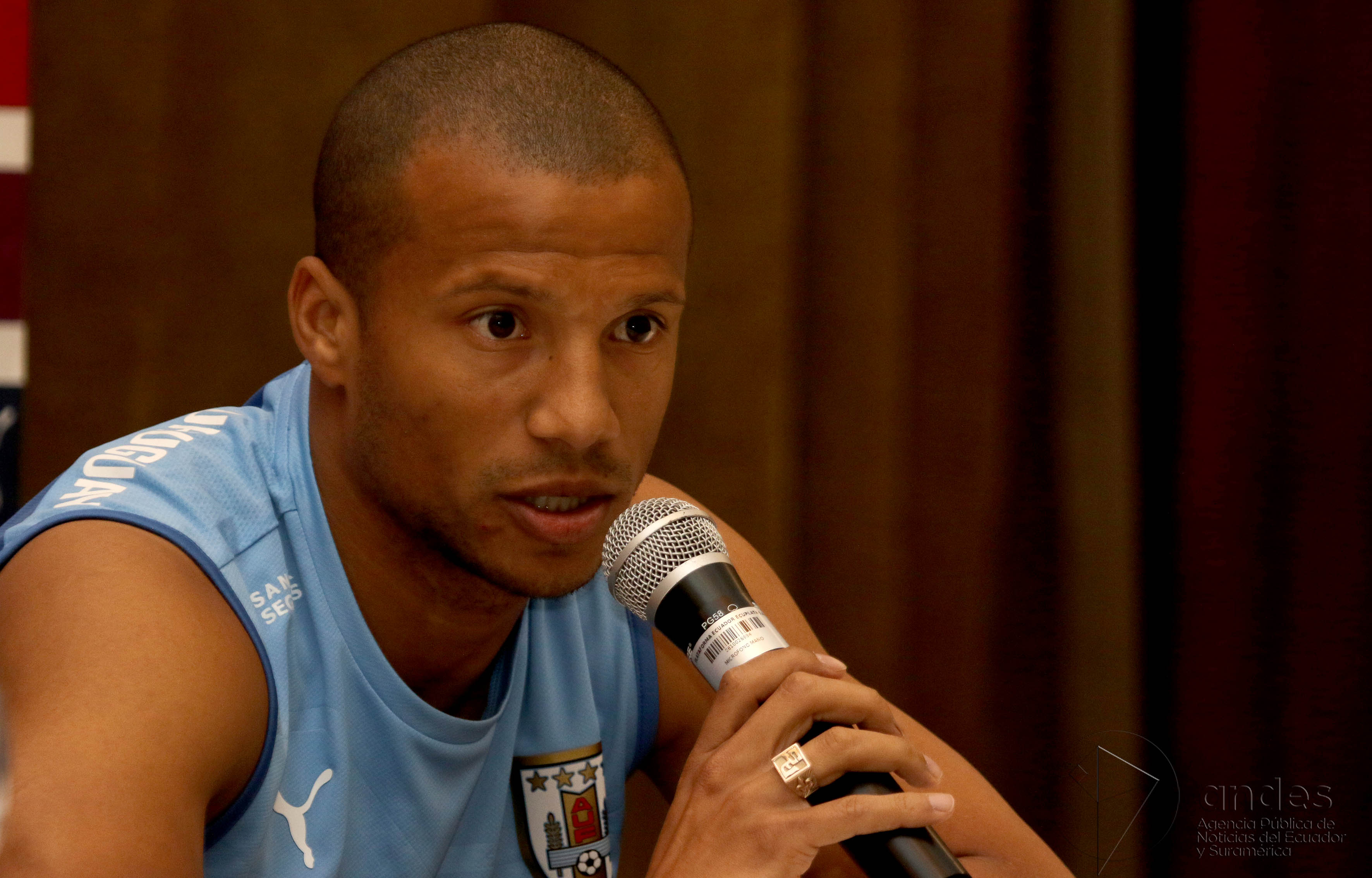 Guayaquil, 11 de nov. del 2015 (Andes).-Carlos Sanchez jugador de la selección uruguaya durante la rueda de prensa que ofrecieron en Guayaquil. Foto:César Muñoz/Andes